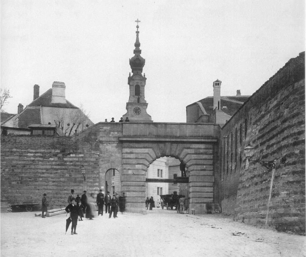 A Becsi kapu lebontasa 1896-ban